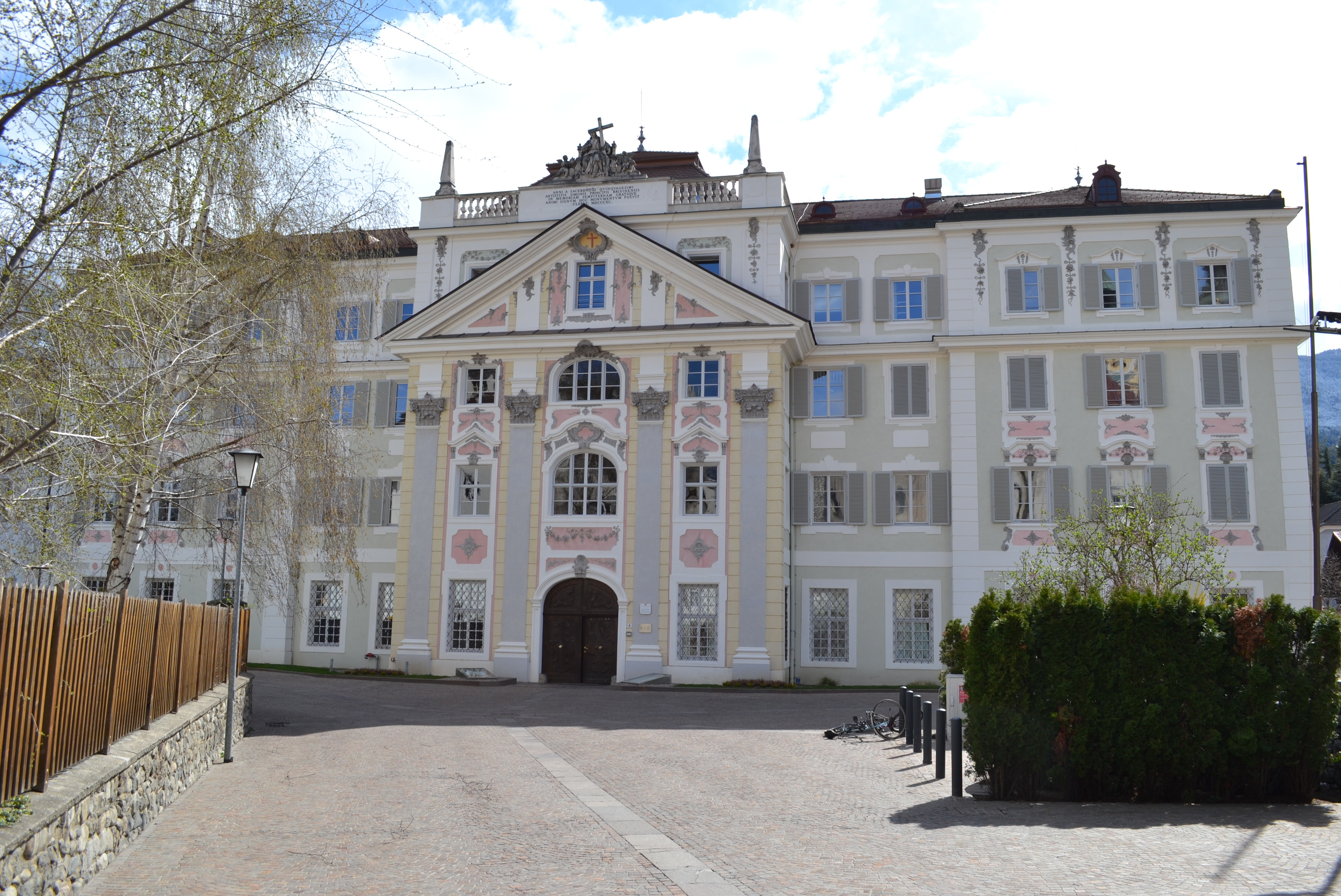 Priesterseminar mit Heiligkreuzkirche in Brixen, Seminarplatz 4.